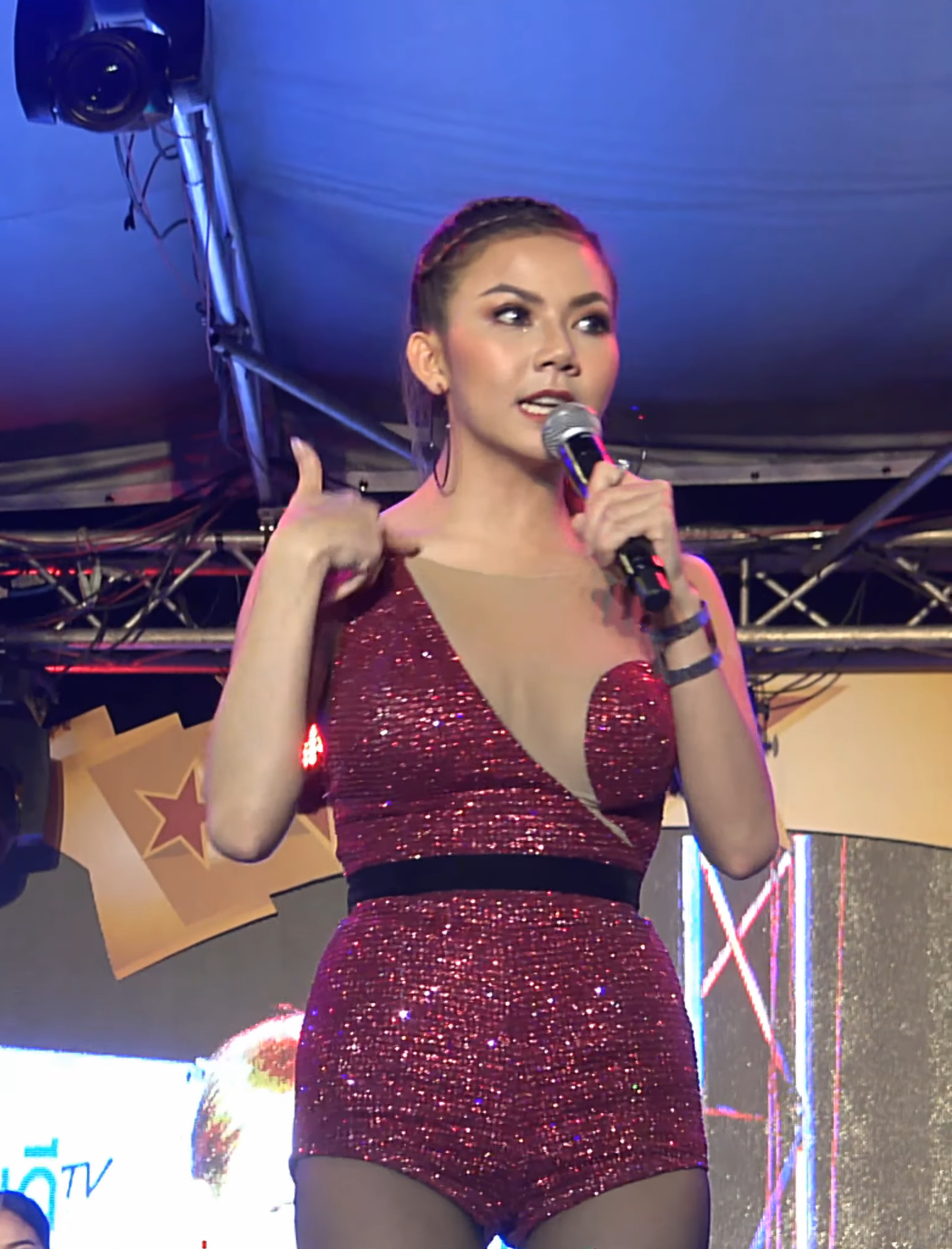 Jah Rsiam in 2017